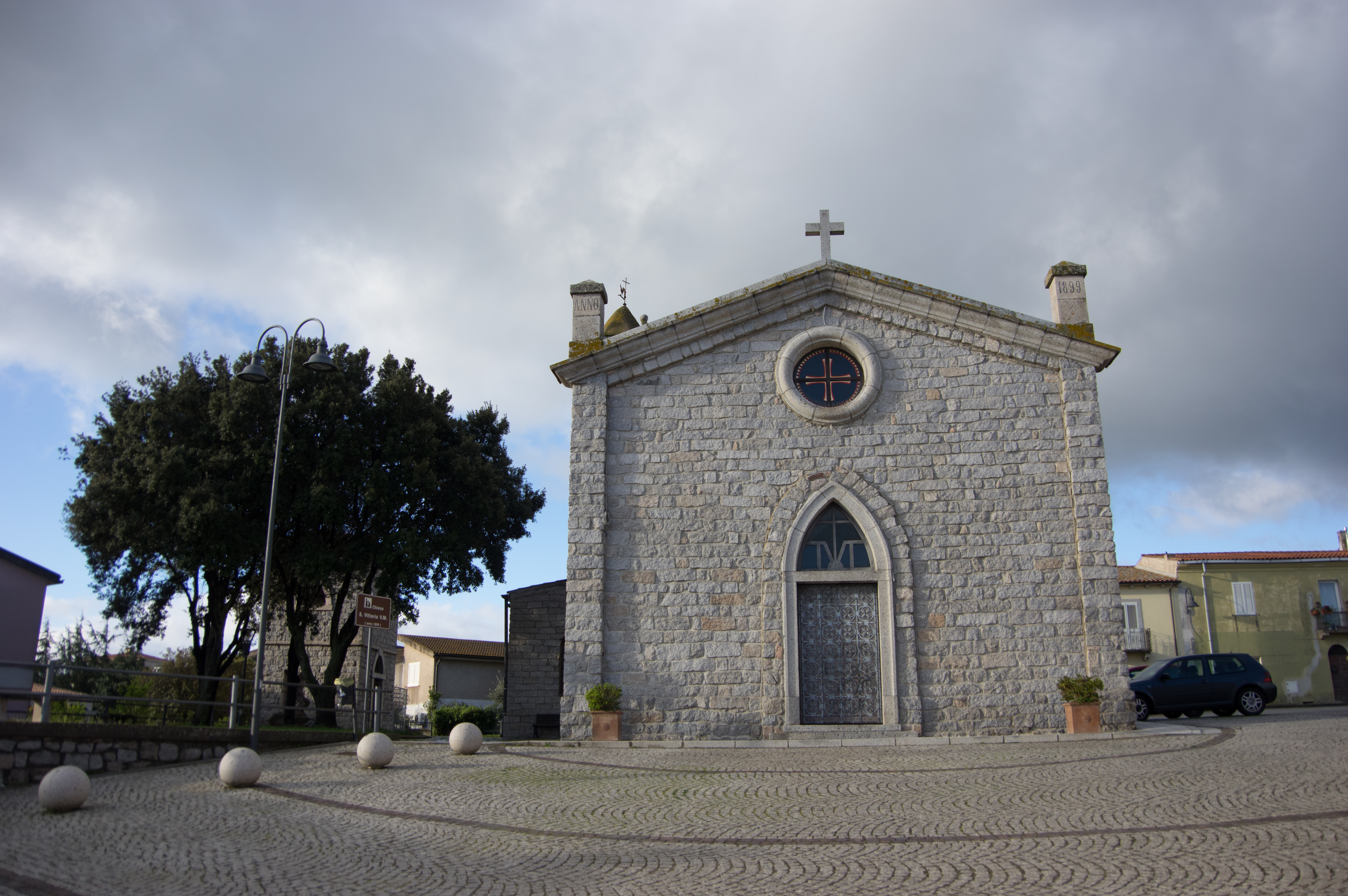 Telti in Sardinien. Die Kirche des Ortes.